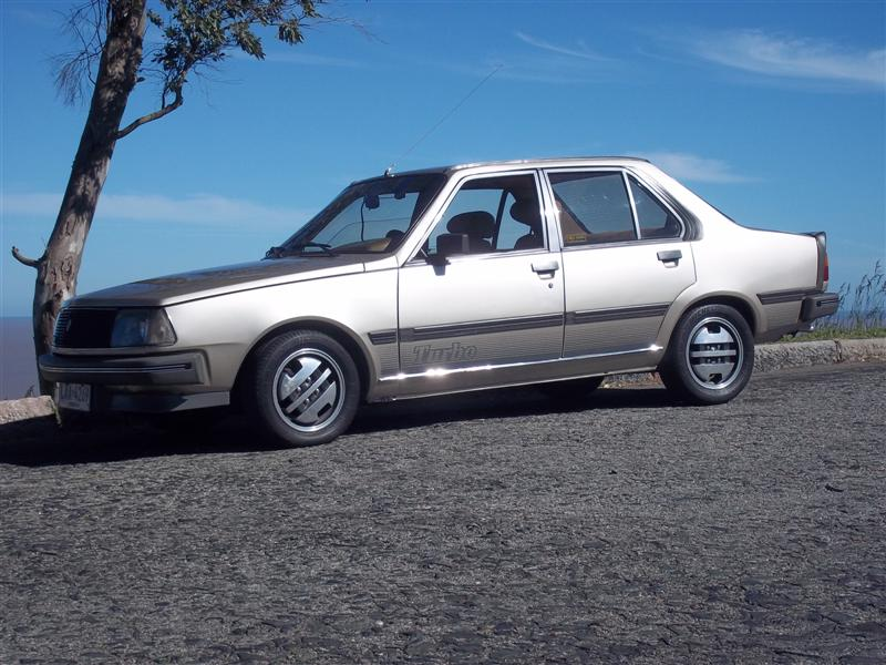 Renault 18 Turbo